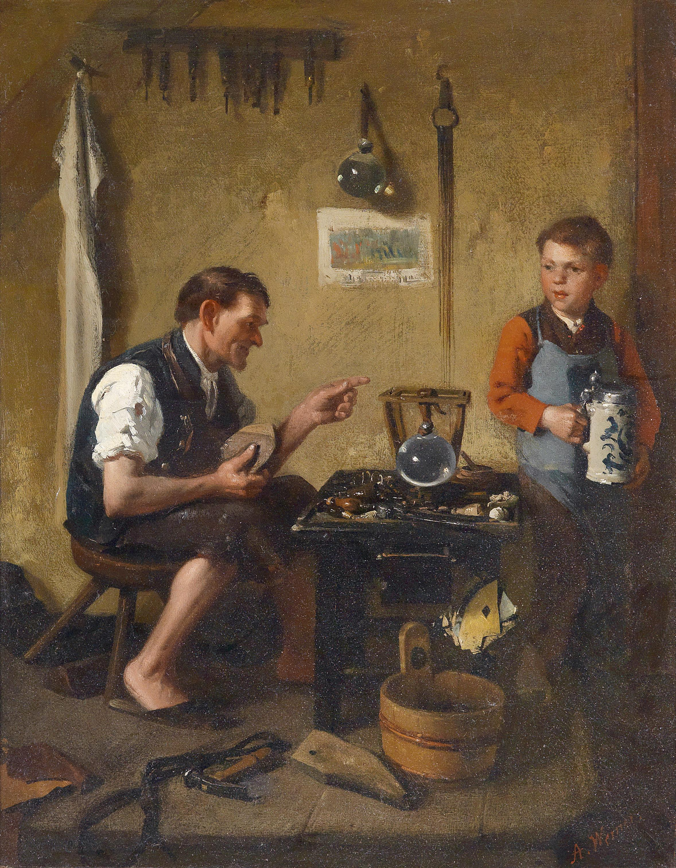 Beim Schuster. Signiert A. Werner. Öl auf Leinwand. 58 x 46 cm